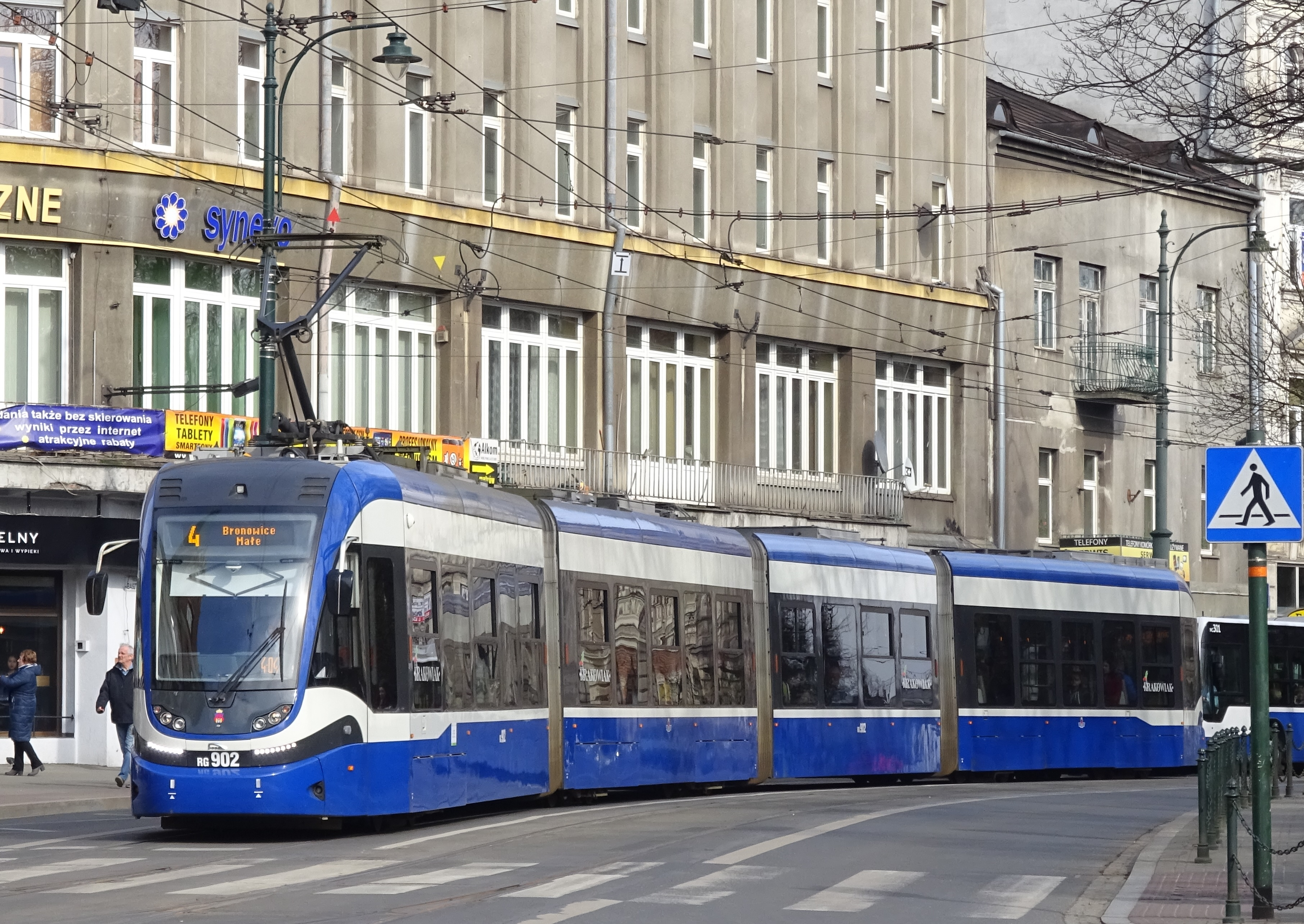 Pesa 2014N „Krakowiak” - tramwaj w Krakowie na ul. Basztowej. 2017